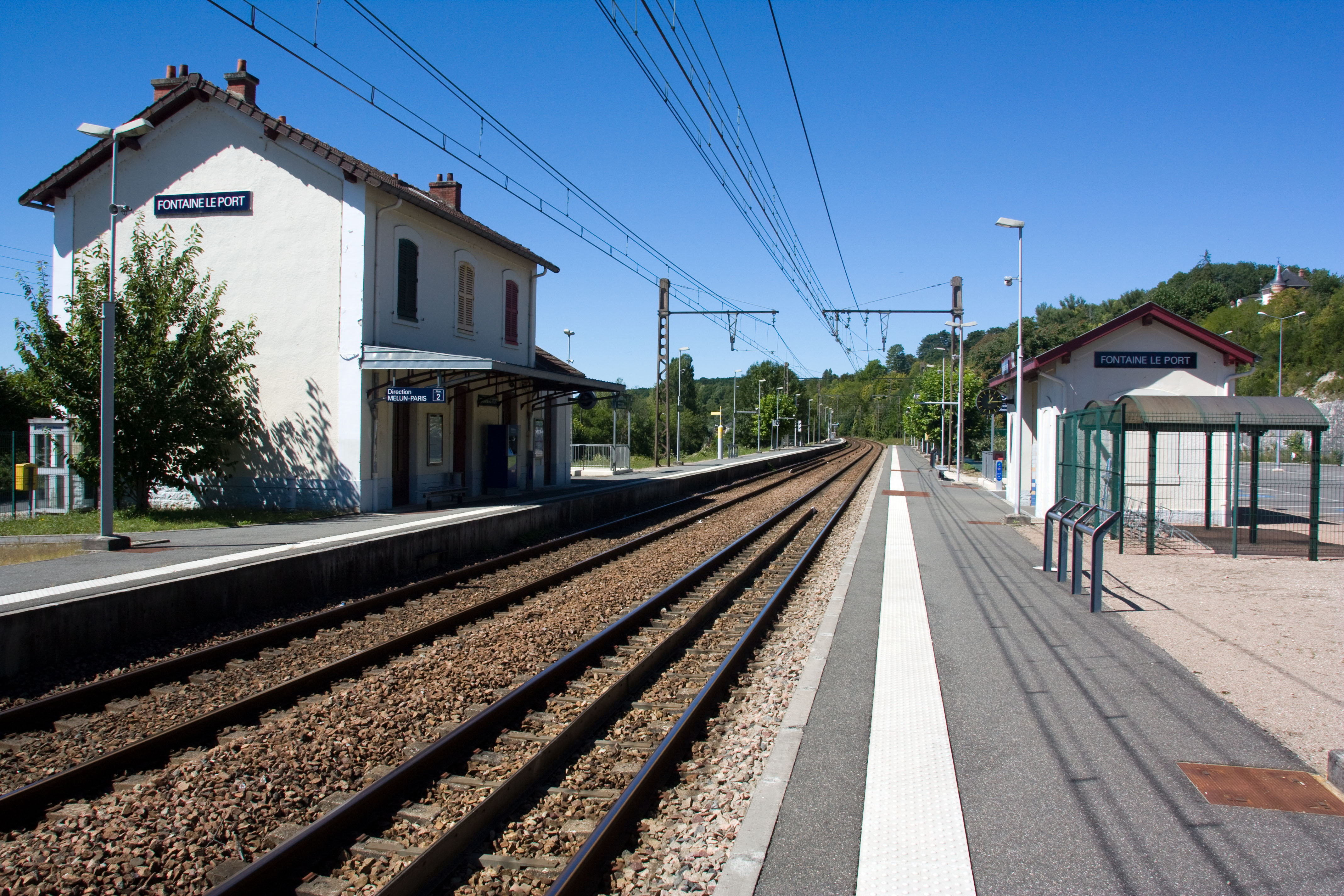 Gare de Fontaine-le-Port, Fontaine-le-Port, Seine-et-Marne, France